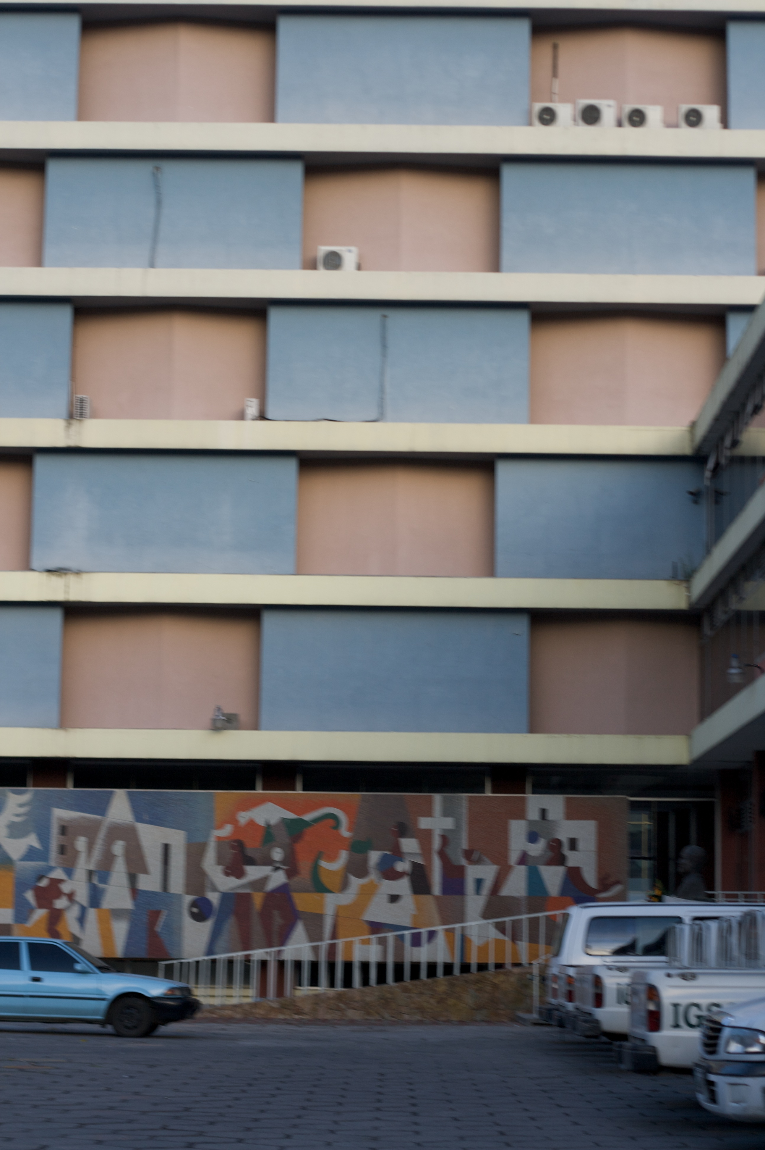 Entrada principal IGSS